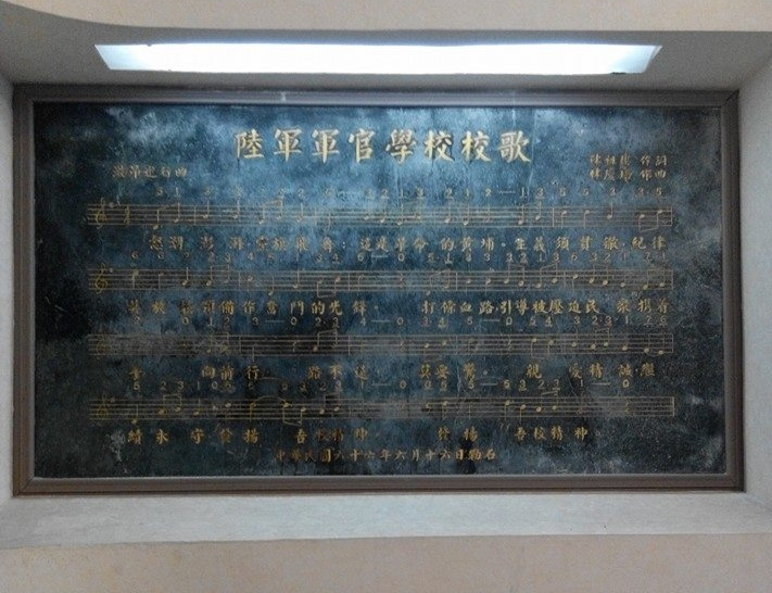 中華民國陸軍軍官學校校歌歌譜石碑。